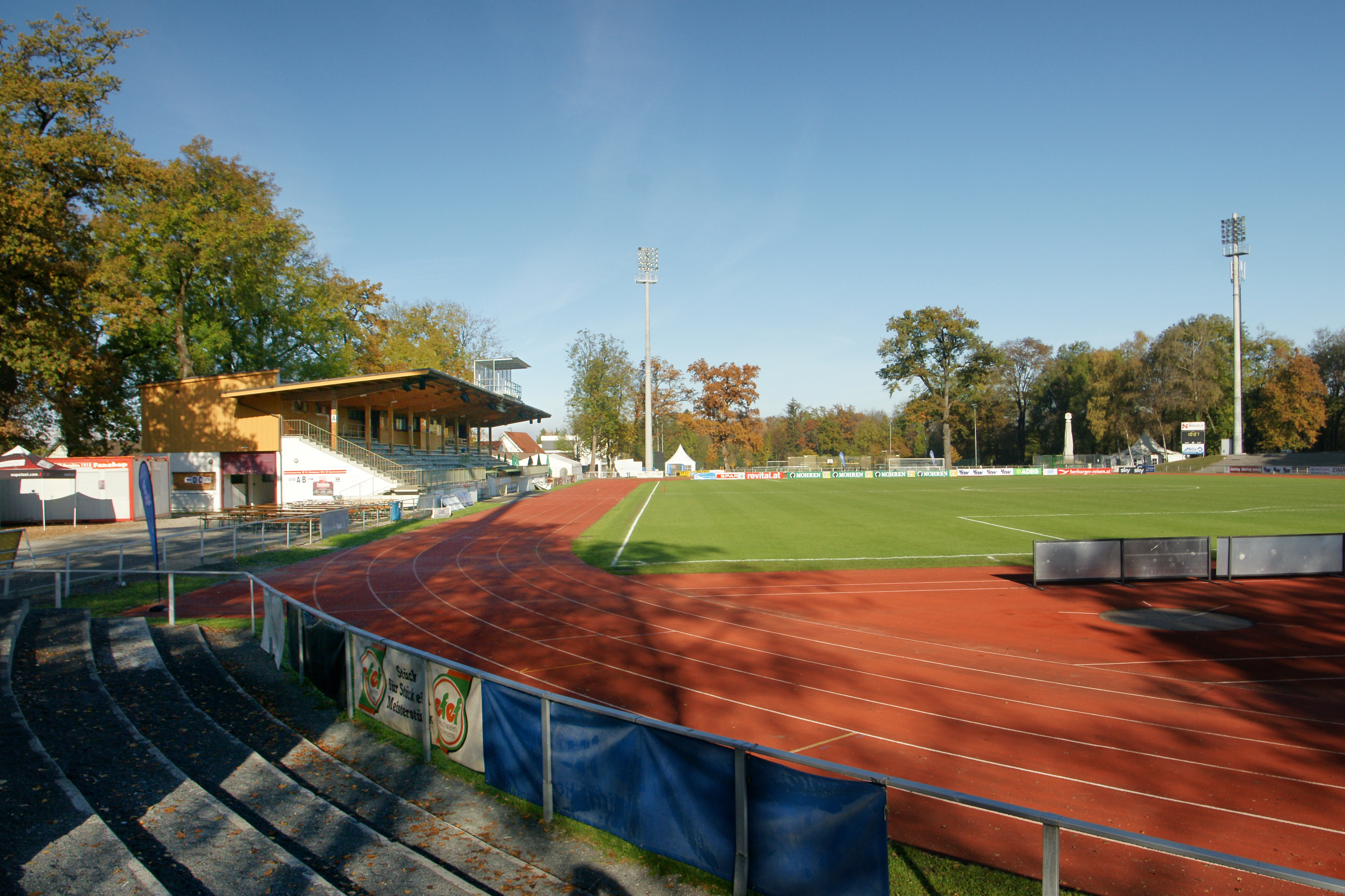 Fußball-Stadion Birkenwiese im Dornbirner Bezirk Schoren.